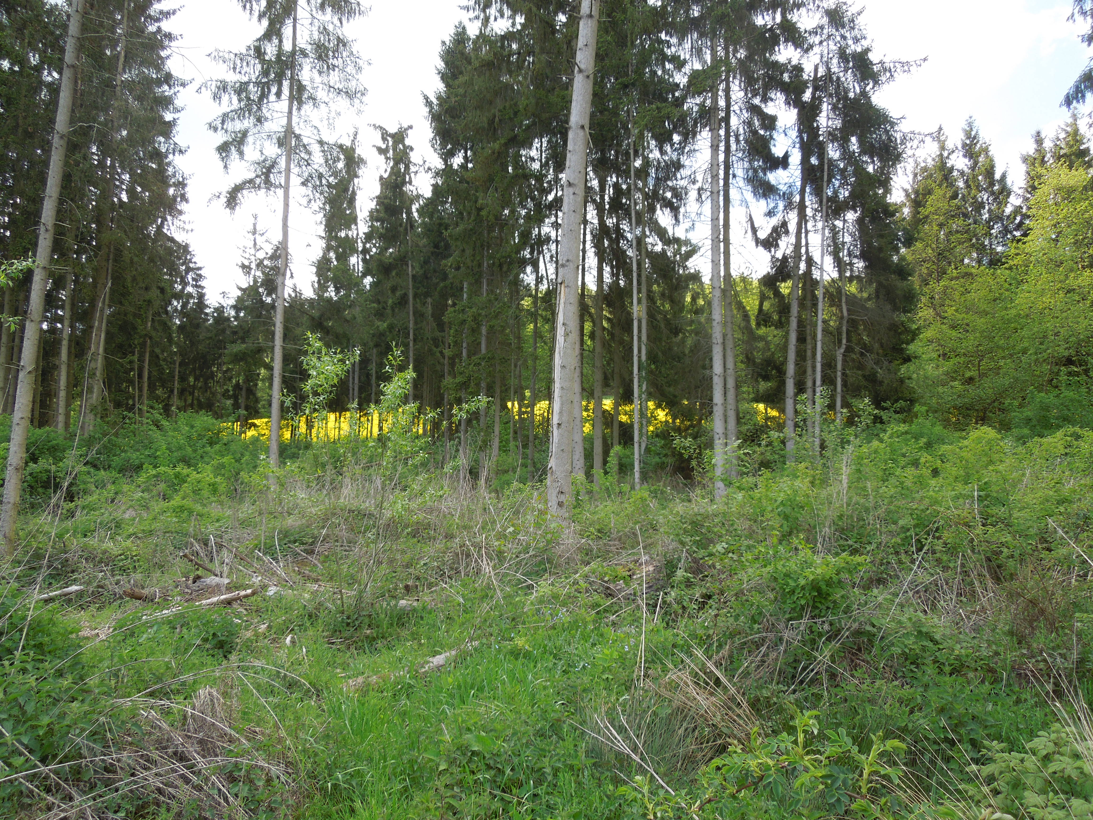 Das sogenannte Tonloch bei Elben. Ab September 1944 waren hier, im „Frauenlager im Tonloch“, von der Gestapo verhaftete Frauen, vom NS-Regime als „jüdische Mischlinge ersten Grades“ oder „jüdisch Versippte“ aus sogenannten privilegierten Mischehen bezeichnet, als Zwangsarbeiterinnen der Organisation Todt unter zutiefst menschenunwürdigen Bedingungen untergebracht.